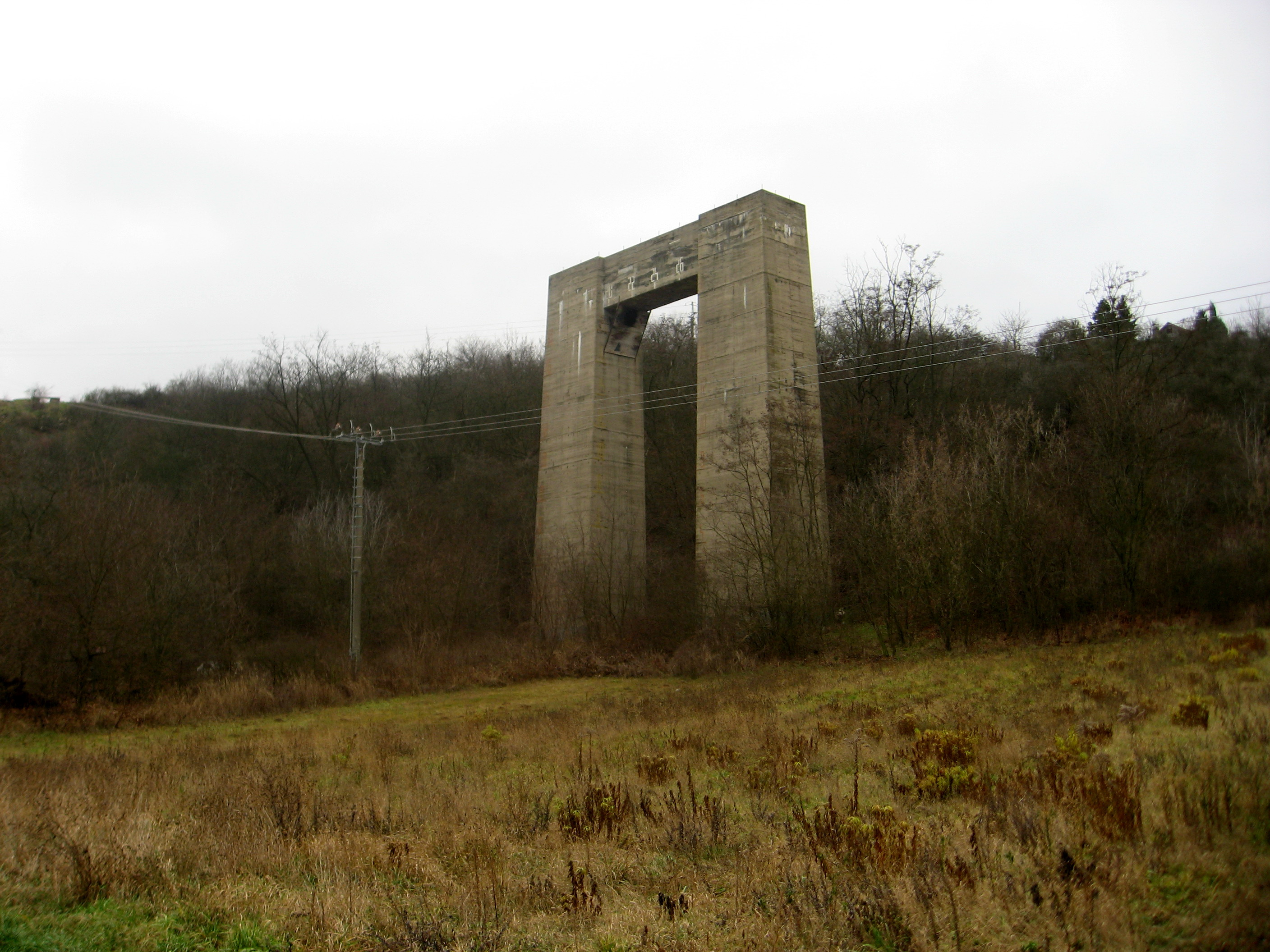 Pilíř pod Brněnskou přehradou